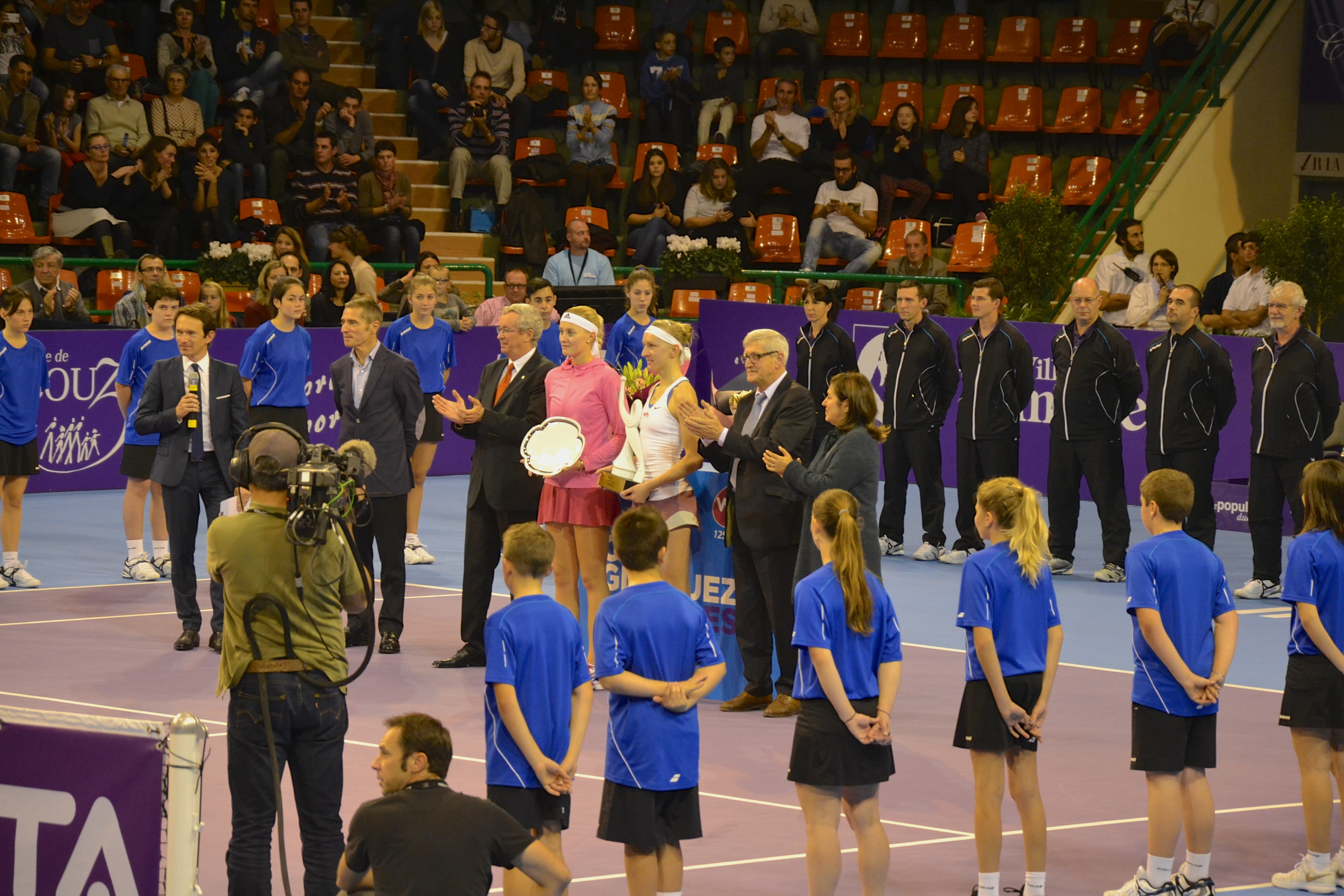 Remise des prix du tableau de simple de l'open de tennis de Limoges 2014.